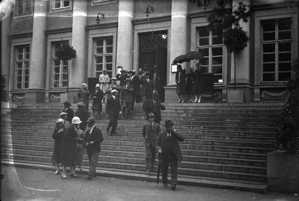 Tampereen kaupunginvaltuuston kokoontuessa ensi kerran kesäloman jälkeen vuonna 1930 Kokoomuksen valtuutettu Niilo Solja vaati, että vastikään hyväksytyn lain mukaan kommunistit eivät olleet vaalikelpoisia kunnallisiin luottamustoimiin. Vaikka laki tulisi voimaan vasta seuraavan vuoden alusta, Solja kehotti voimakkain sanoin kommunisteja eroamaan.